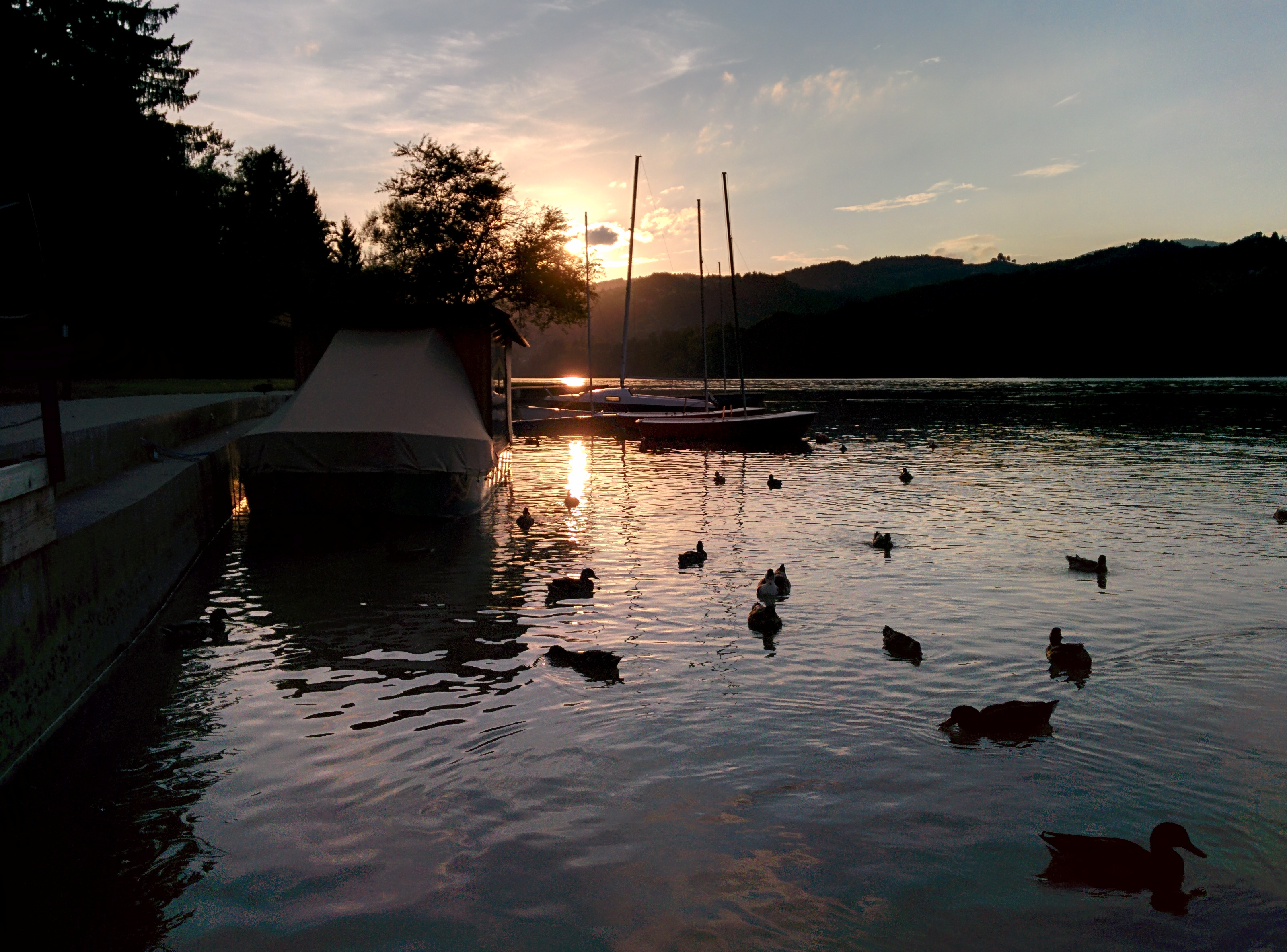 Drava center